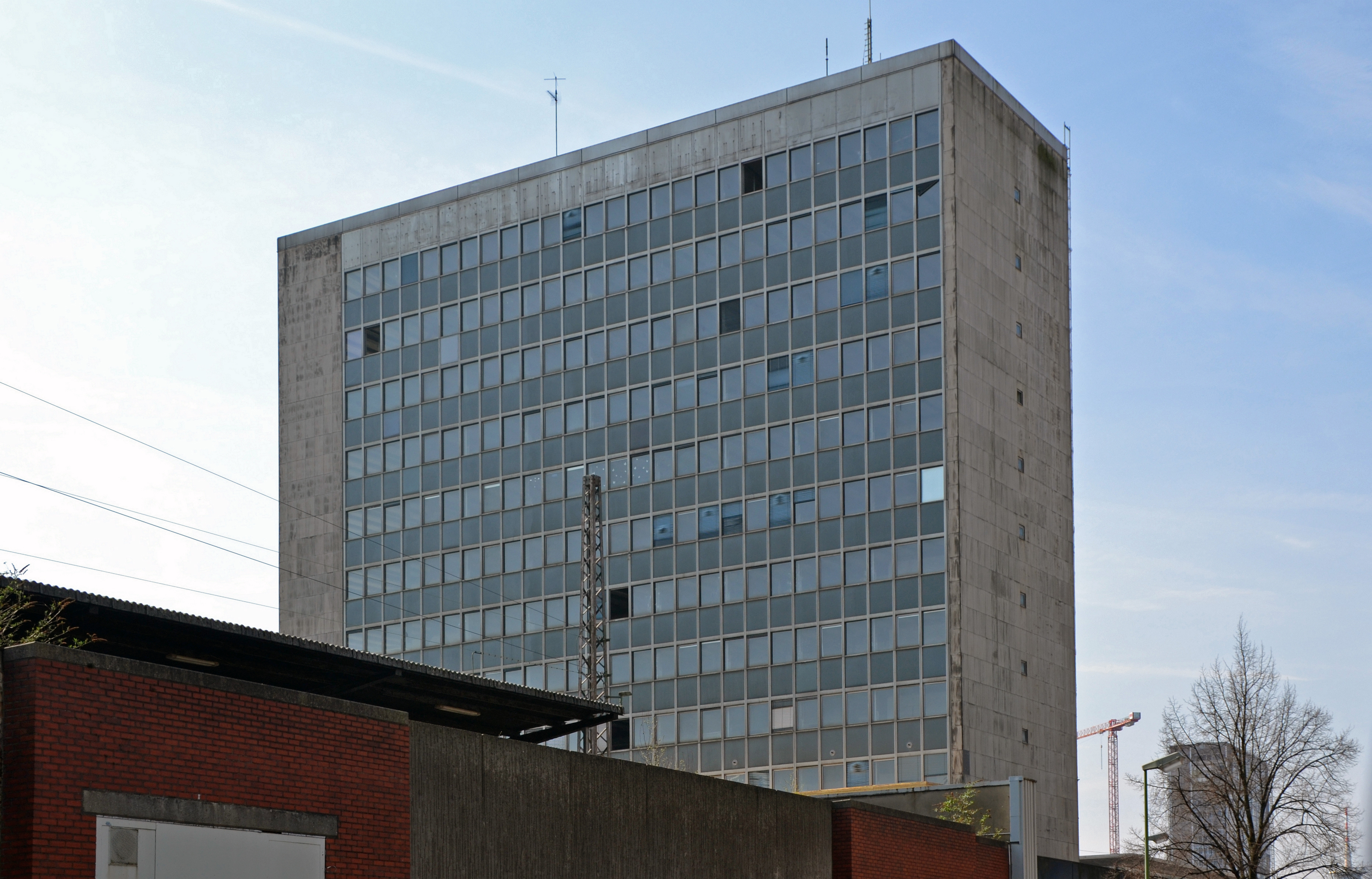 Essen Hauptbahnhof, ehemaliges Verwaltungsgebäude der Deutschen Bahn (abgerissen 2017), zuletzt war der von der Deutschen Bahn gegründete Immobilienentwickler Aurelis Eigentümer